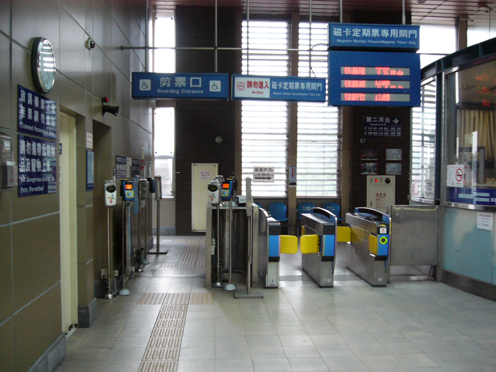 臺灣鐵路管理局百福車站大廳的剪票口與Omron門檔式閘門。